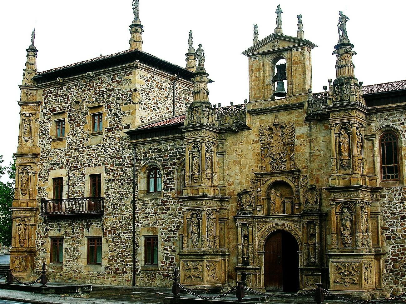 Universidad Sancti Spiritus, Oñate (Guipúzcoa)